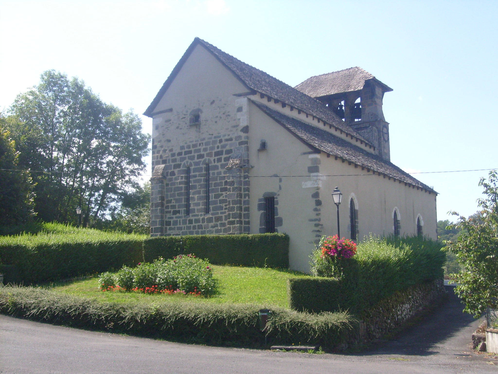 Eglise romane